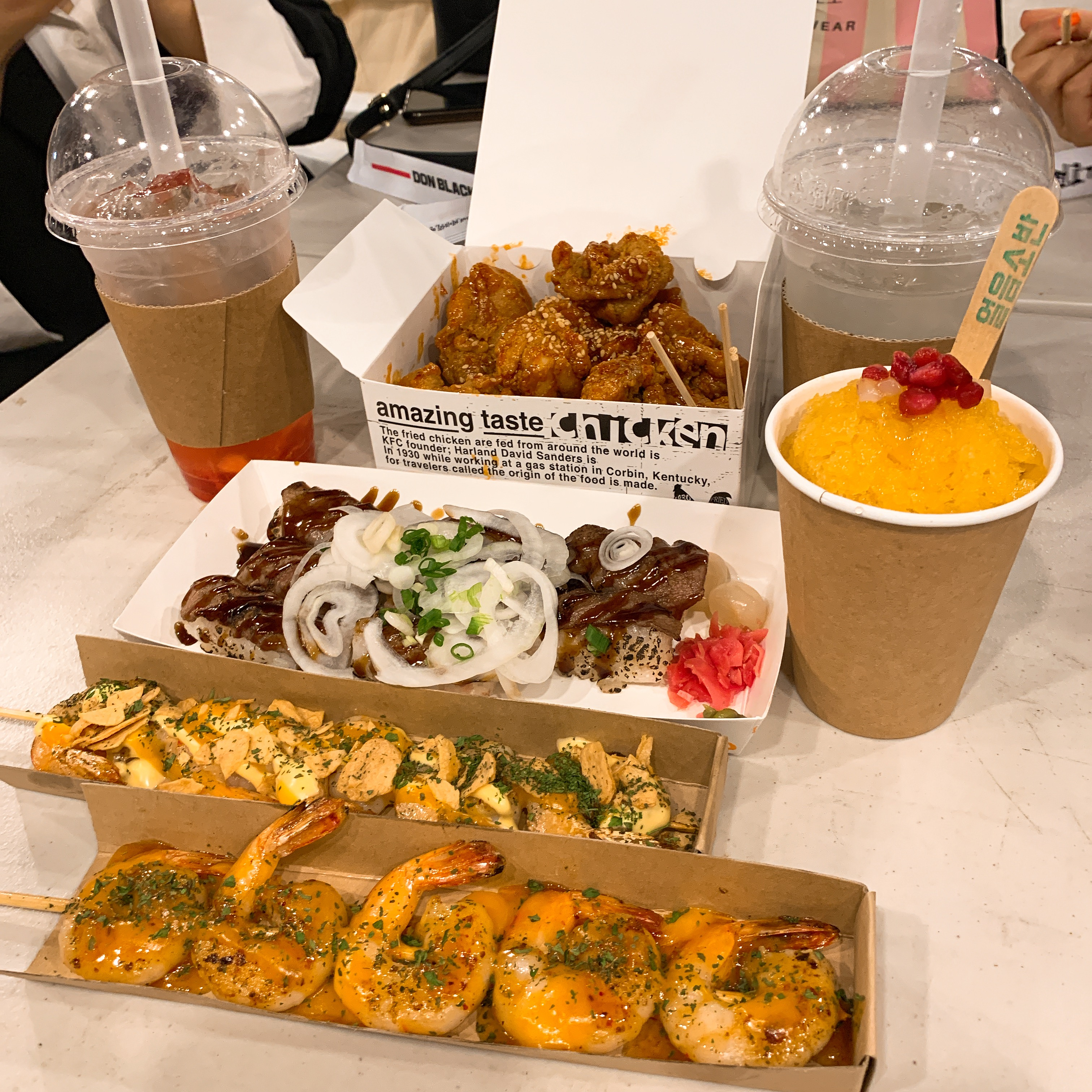 망고슬러쉬, 딸기에이드, 레몬에이드, 두 가지 맛 새우꼬치, 매콤닭강정, 소고기초밥.